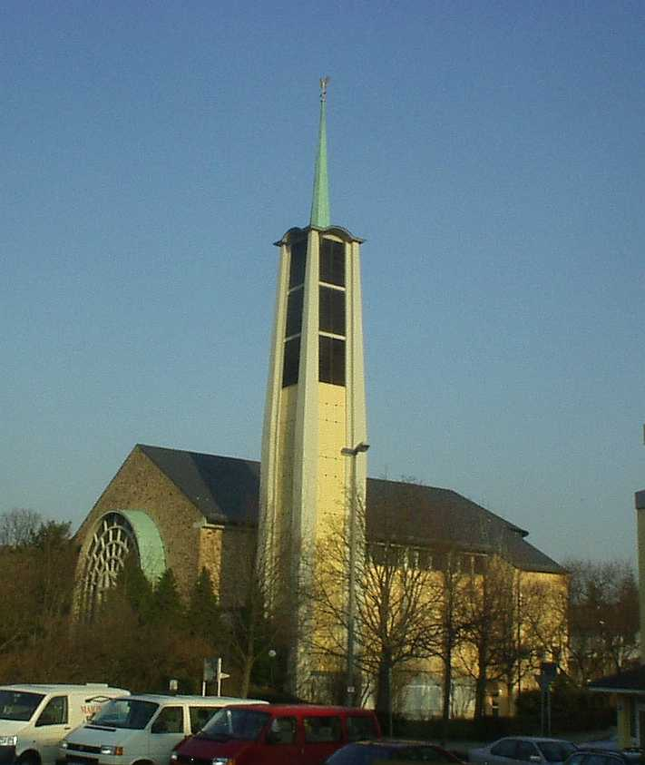 Kath. Kirche St. Katharina